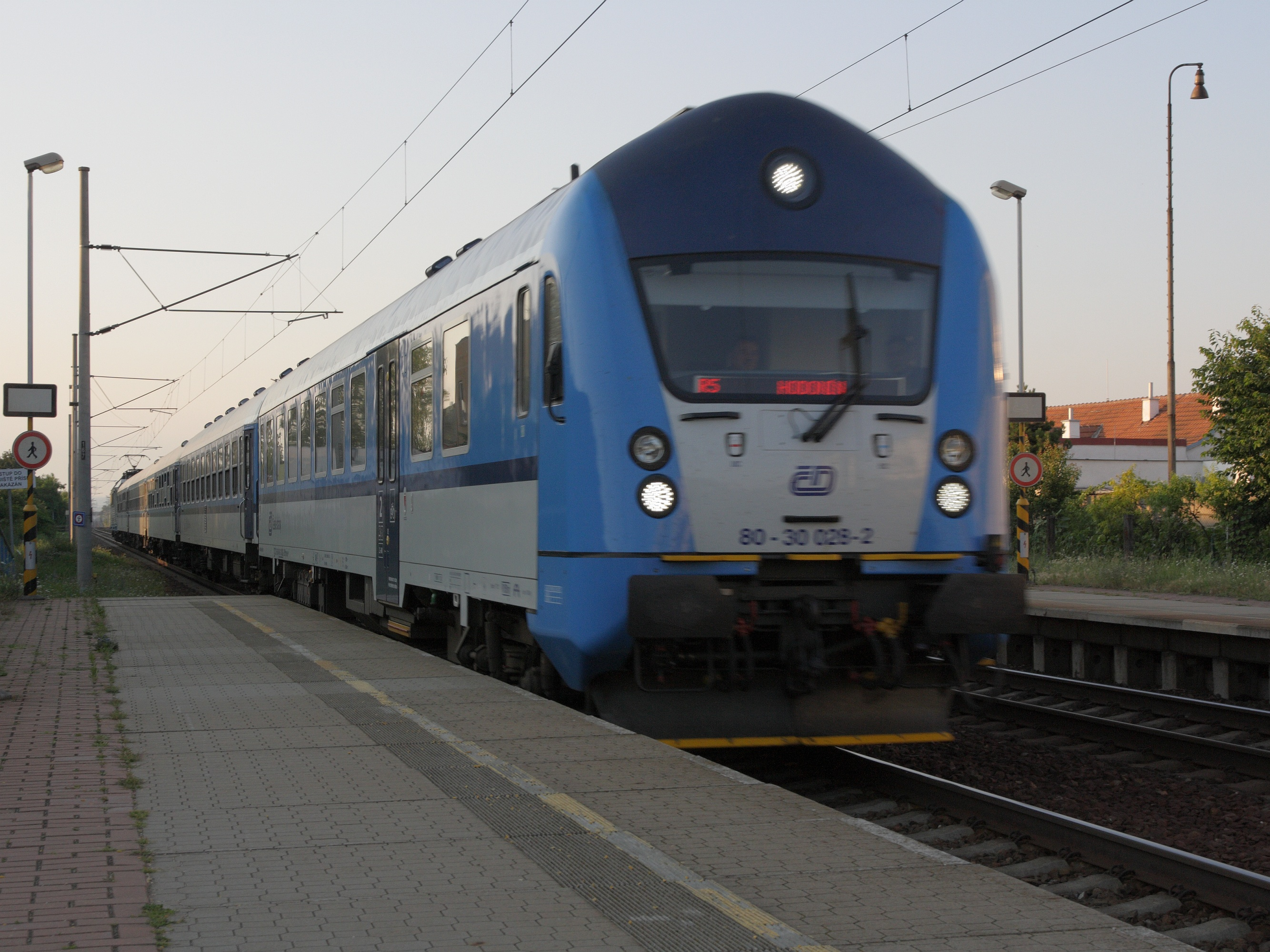 Rajhrad - Řídicí vůz Bfhpvee295 ČD na čele vlaku linky R5 (Brno-Hodonín) Integrovaného dopravního systému Jihomoravského kraje (IDS JMK).